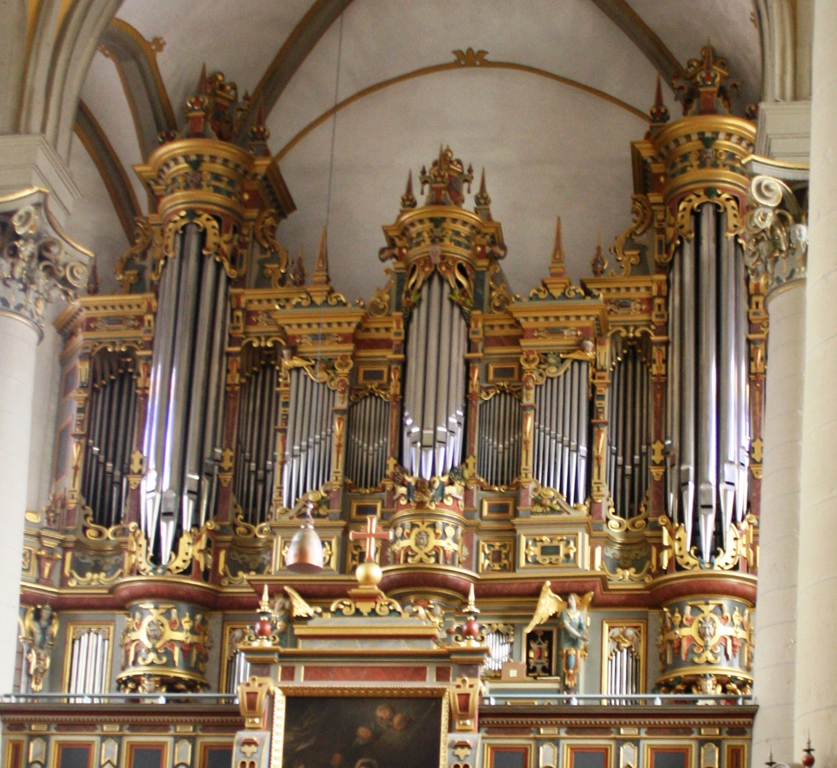 Bückeburg, Stadtkirche, Orgel